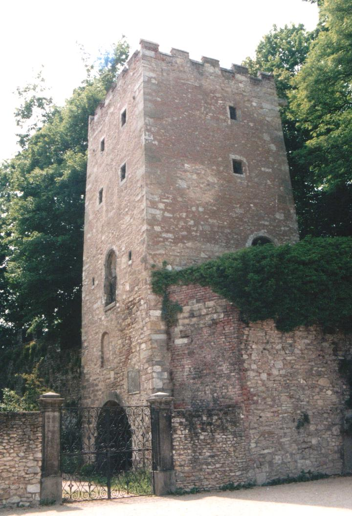 Prebrunnturm im Regensburger Herzogspark Aufnahmejahr:1998